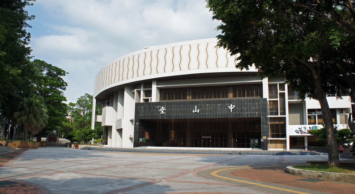 台中市中山堂。